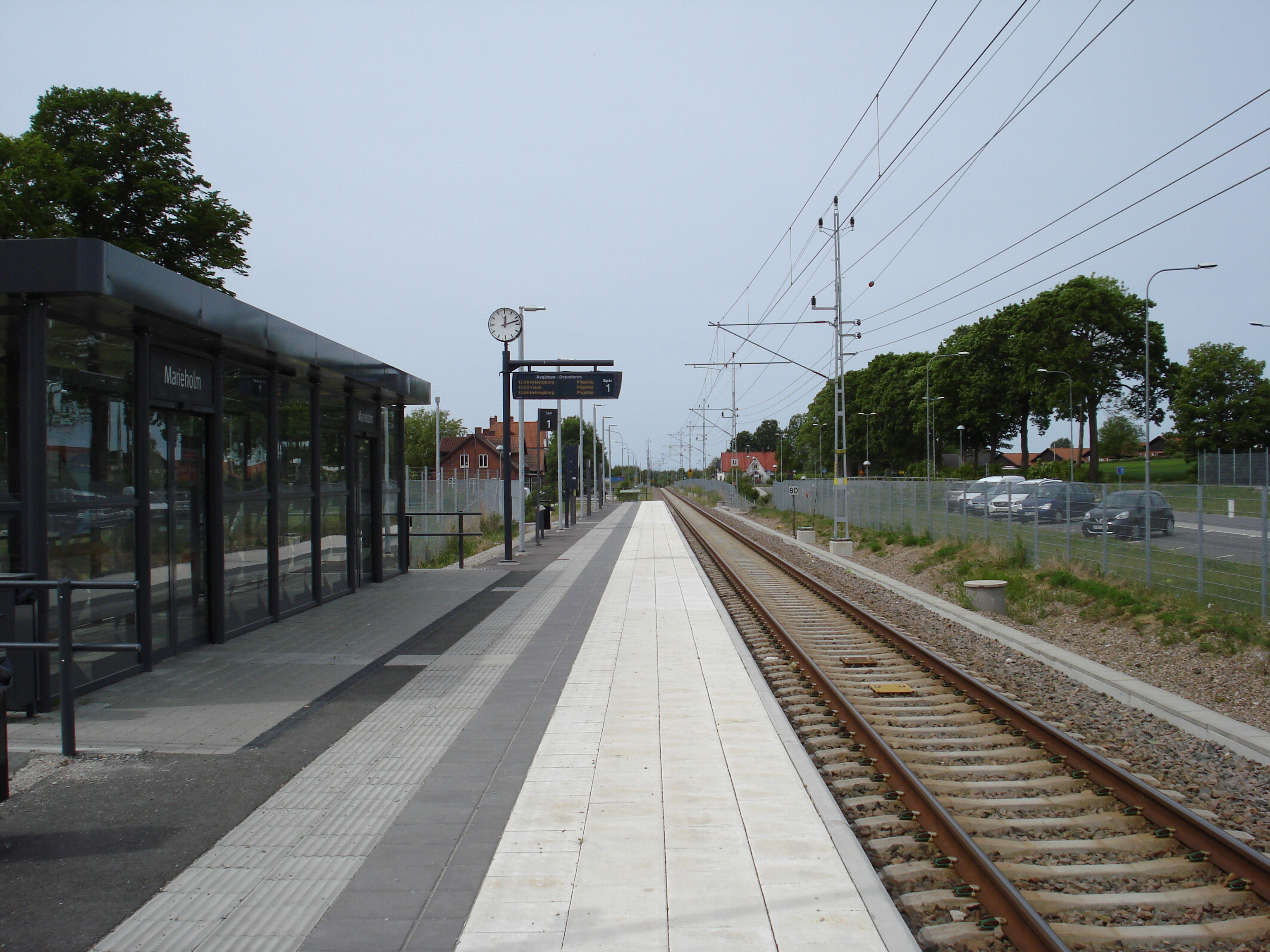 Tågstationen i Marieholm.